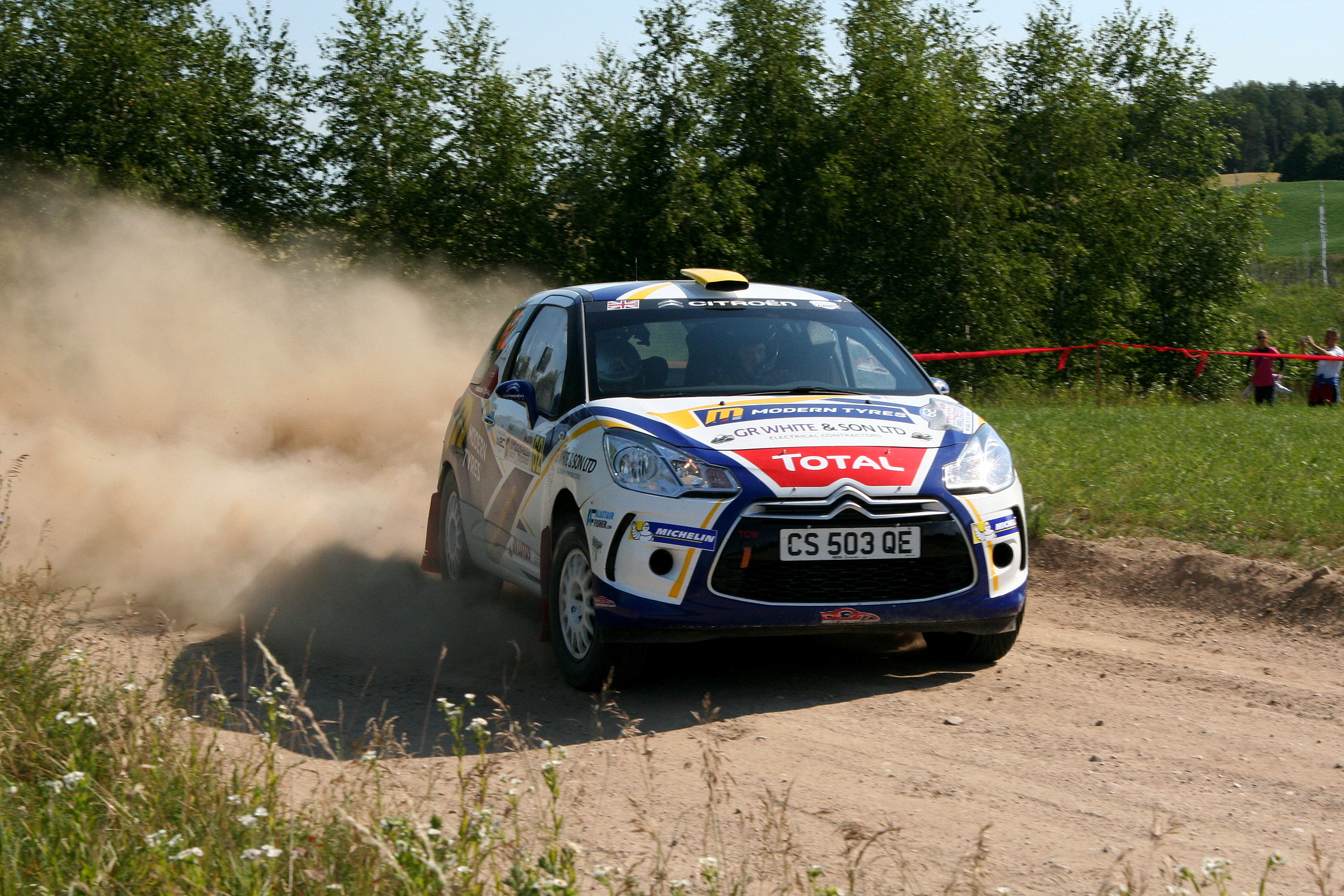 Alastair Fisher podczas Rajdu Polski 2014, 11 OS Chmielówka 1